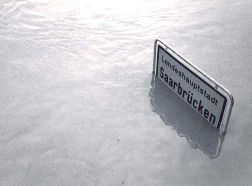 Überflutete Stadtautobahn A 620 in Saarbrücken.